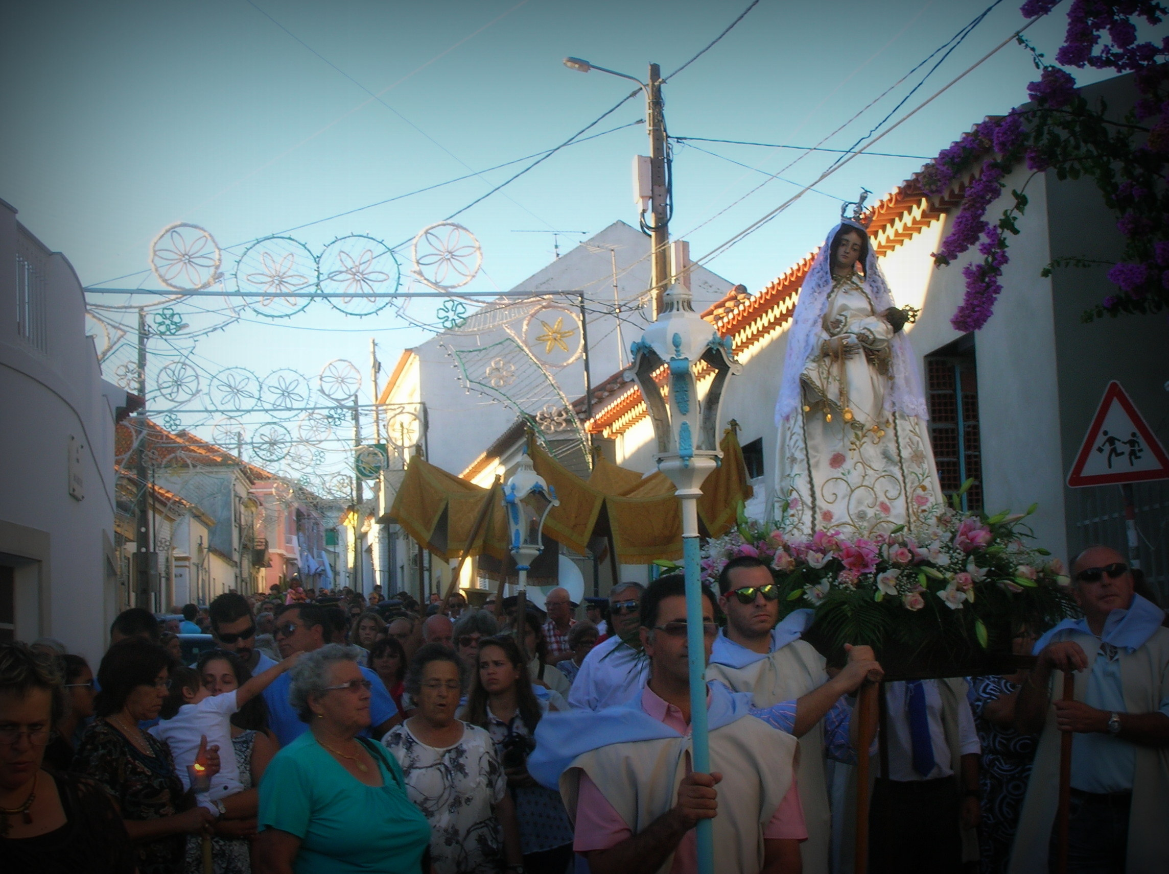 Procissão de N. Sr. da Graça no ano de 2012. Passagem do cortejo religioso junto ao Largo da Praça (actual Praça Humberto Delgado)